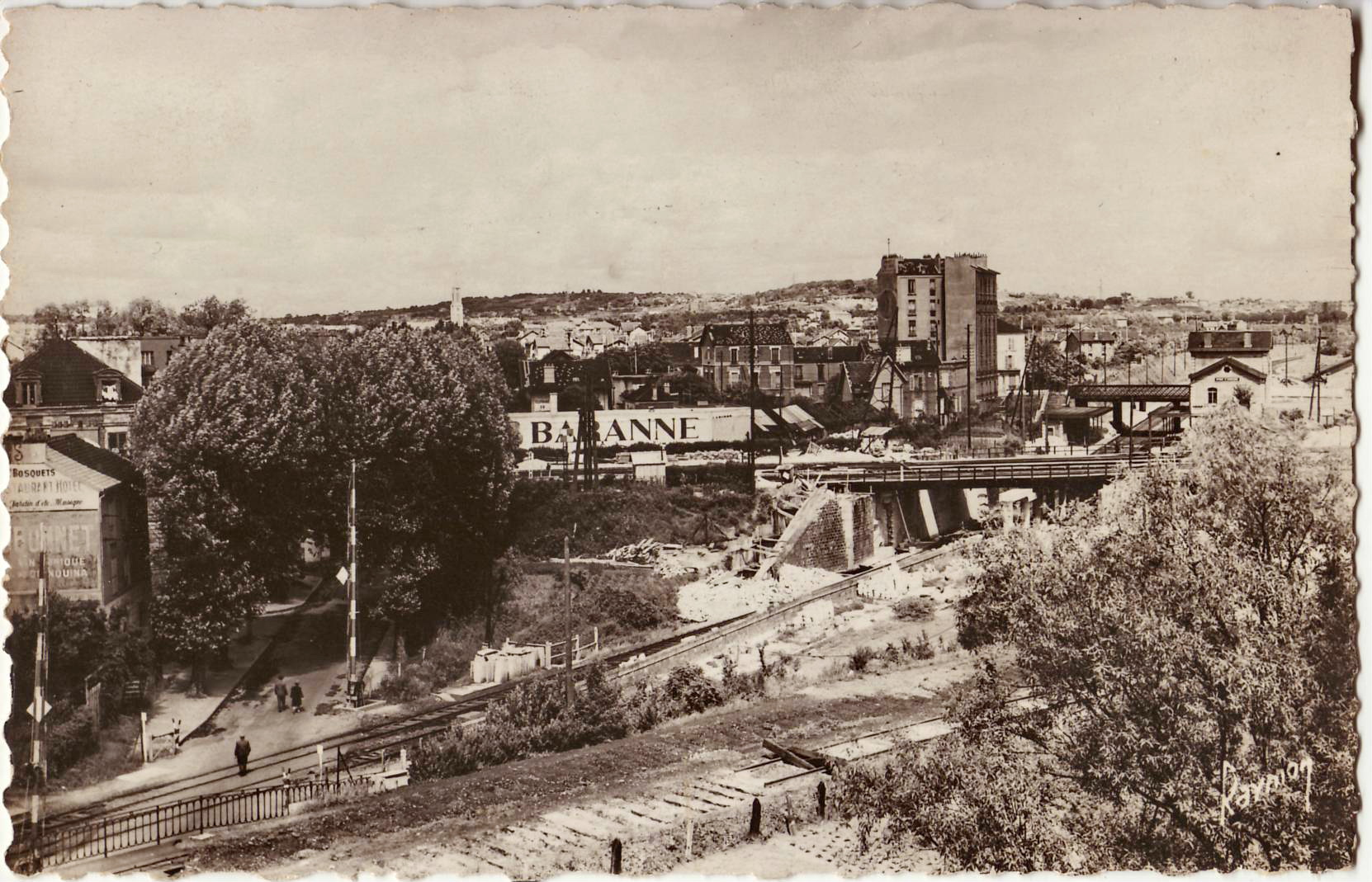 Carte postale semi-moderne, éditée par Geoffroy, éditeur à Épinay-sur-Seine, n°11 : ÉPINAY-SUR-SEINE - Vue générale sur Villetaneuse. Le cliché est en fait orienté sur Montmagny Il s'agit du nœud ferroviaire de la Gare d'Épinay - Villetaneuse, avec, au premier plan, le raccordement militaire entre les voies du Nord et la Grande Ceinture, dont les voies étaient en train d'êtré déposées, puis les voies de la Grande Ceinture (avec, entre les ponts, sa gare d'Épinay) protégées par le passage à niveau de la Rue du Chemin de fer (supprimé lors de la déviation de la RD 23, qui passe maintenant sensiblement sur l'emplacement du raccordement militaire), puis le pont supportant les voies des lignes Paris - Pontoise et Paris - Le Tréport-Mers. Tout au fond, le second pont permet le franchissement de la Grande Ceinture par la RN 328. On distingue également les collines de la Forêt de Montmorency.